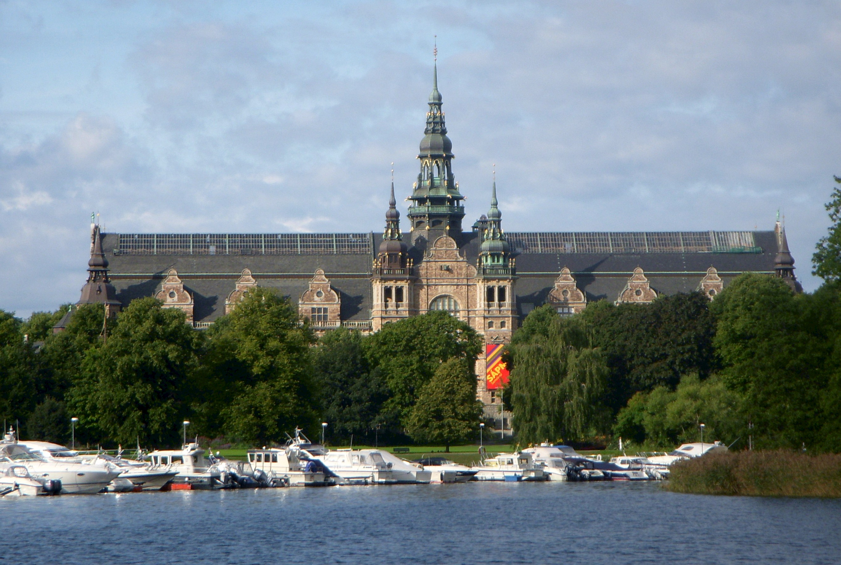 Nordiska museet i Stockholm